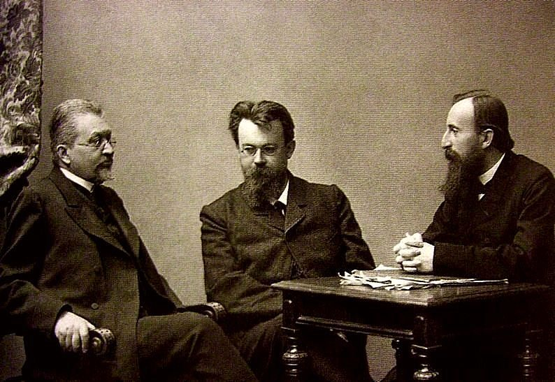 Лидеры "Союза освобождения" И. И. Петрункевич, В. И. Вернадский и Д. И. Шаховской обсуждают тактику борьбы с самодержавием. 1900-е годы.